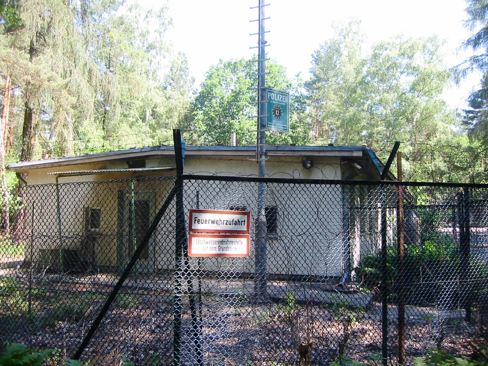 Verwaltungsgebäude des Sprengplatzes Grunewald in Berlin-Nikolassee (Deutschland)